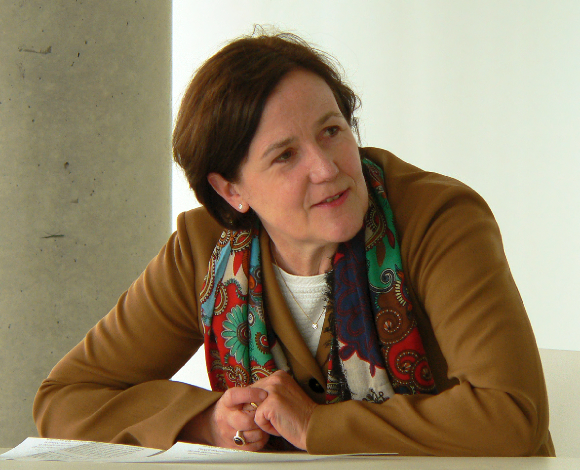 Die Präsidentin des Niedersächsischen Landesamtes für Denkmalpflege Christina Krafczyk